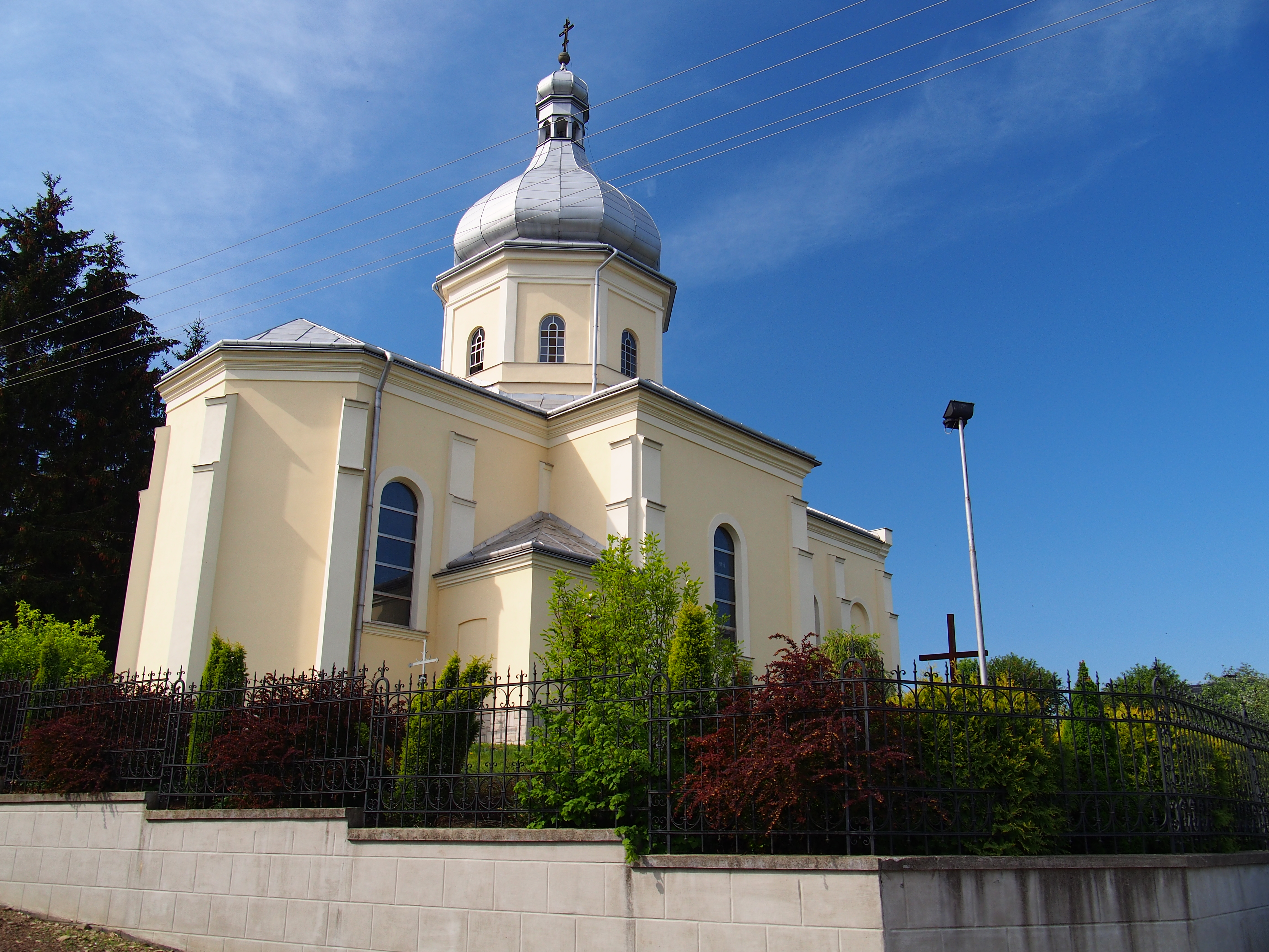 Nehrybka - pierwotnie cerkiew greckokatolicka p.w. św. Stefana Męczennika, obecnie rzymskokatolicki kościół parafialny p.w. Niepokalanego Poczęcia NMP, 1885-1892, 1926